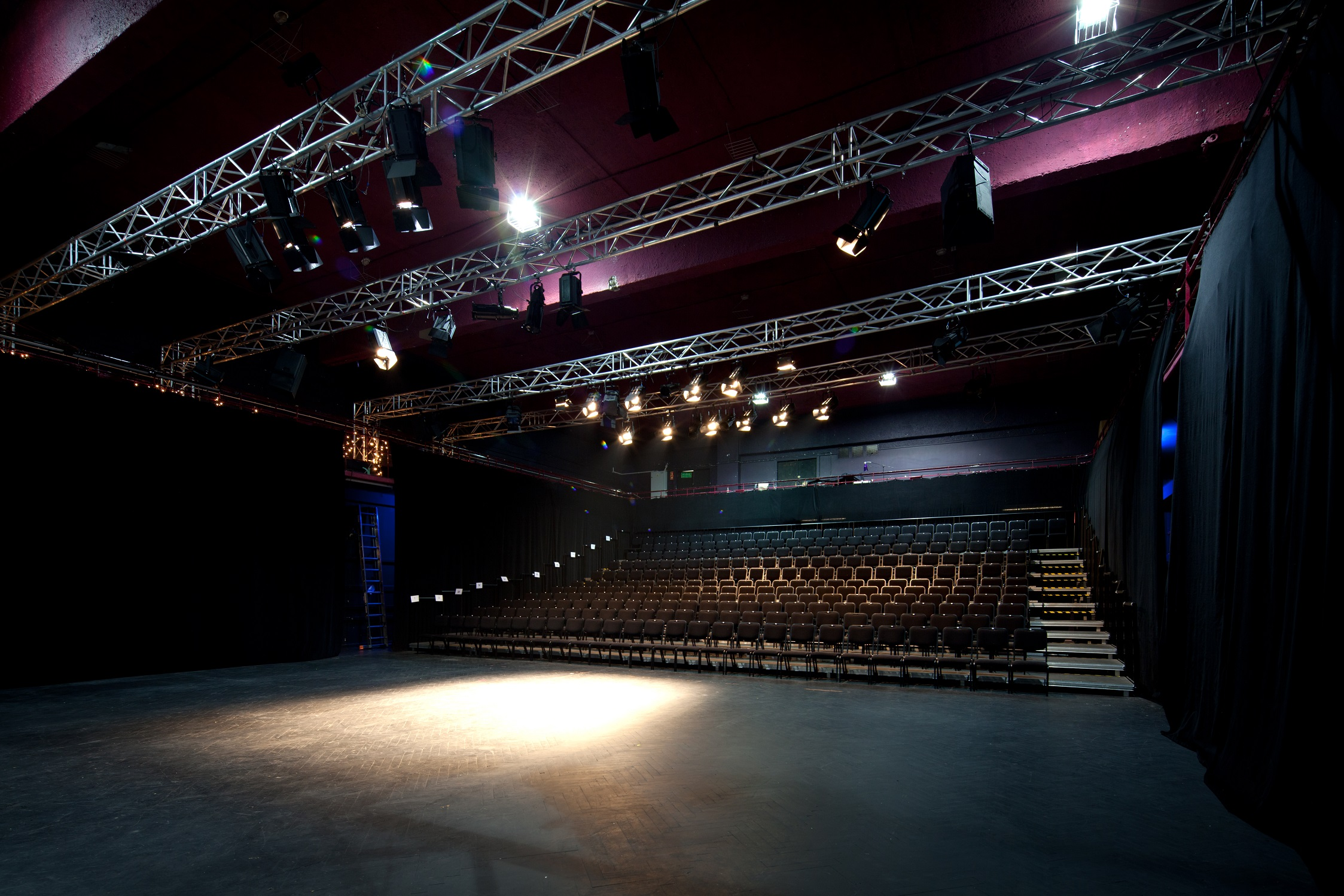 Teatr IMKA duża scena